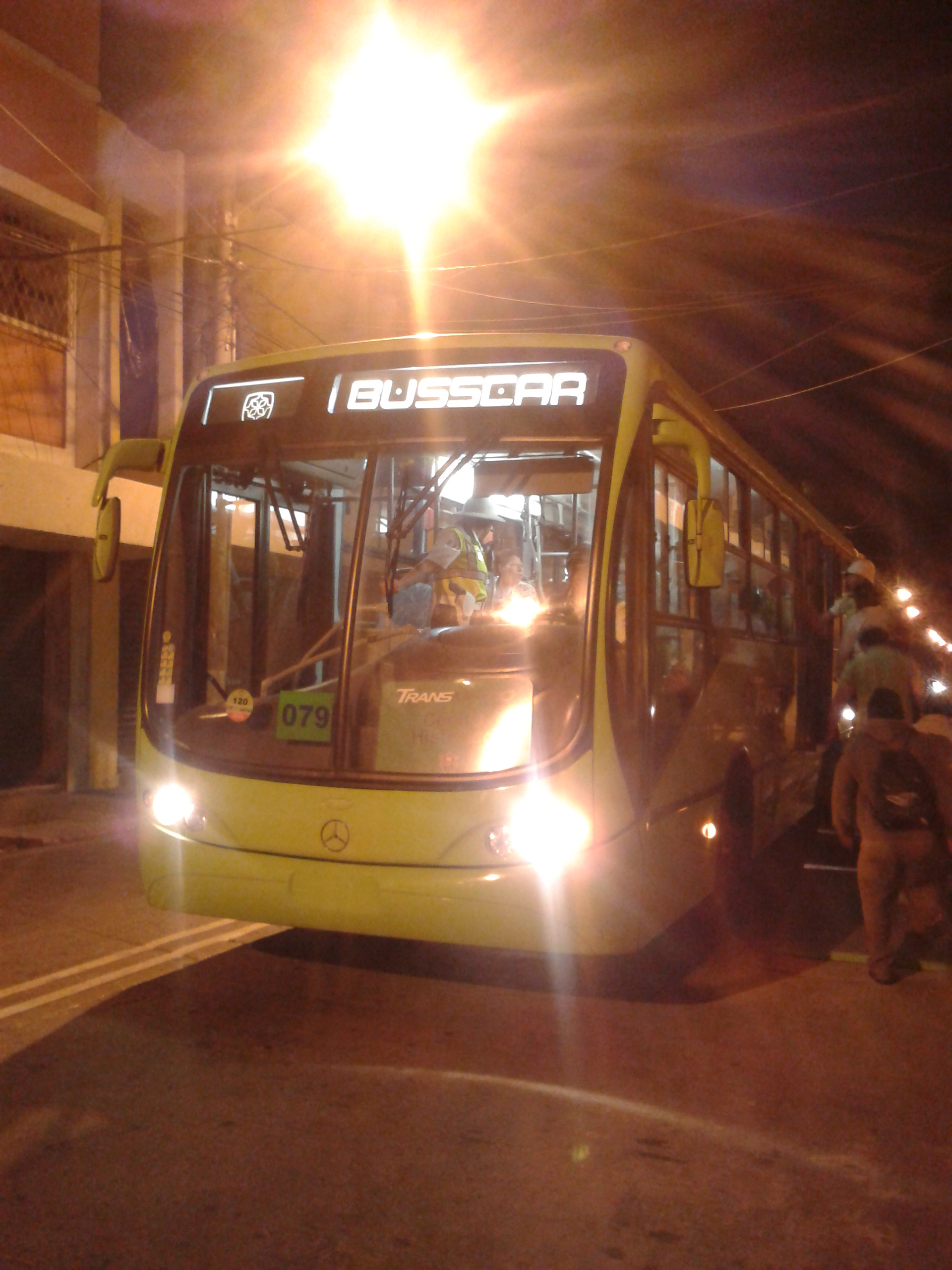 Vista nocturna del recorrido del Transmetro de la Ciudad de Guatemala en el Eje Centro Histórico.